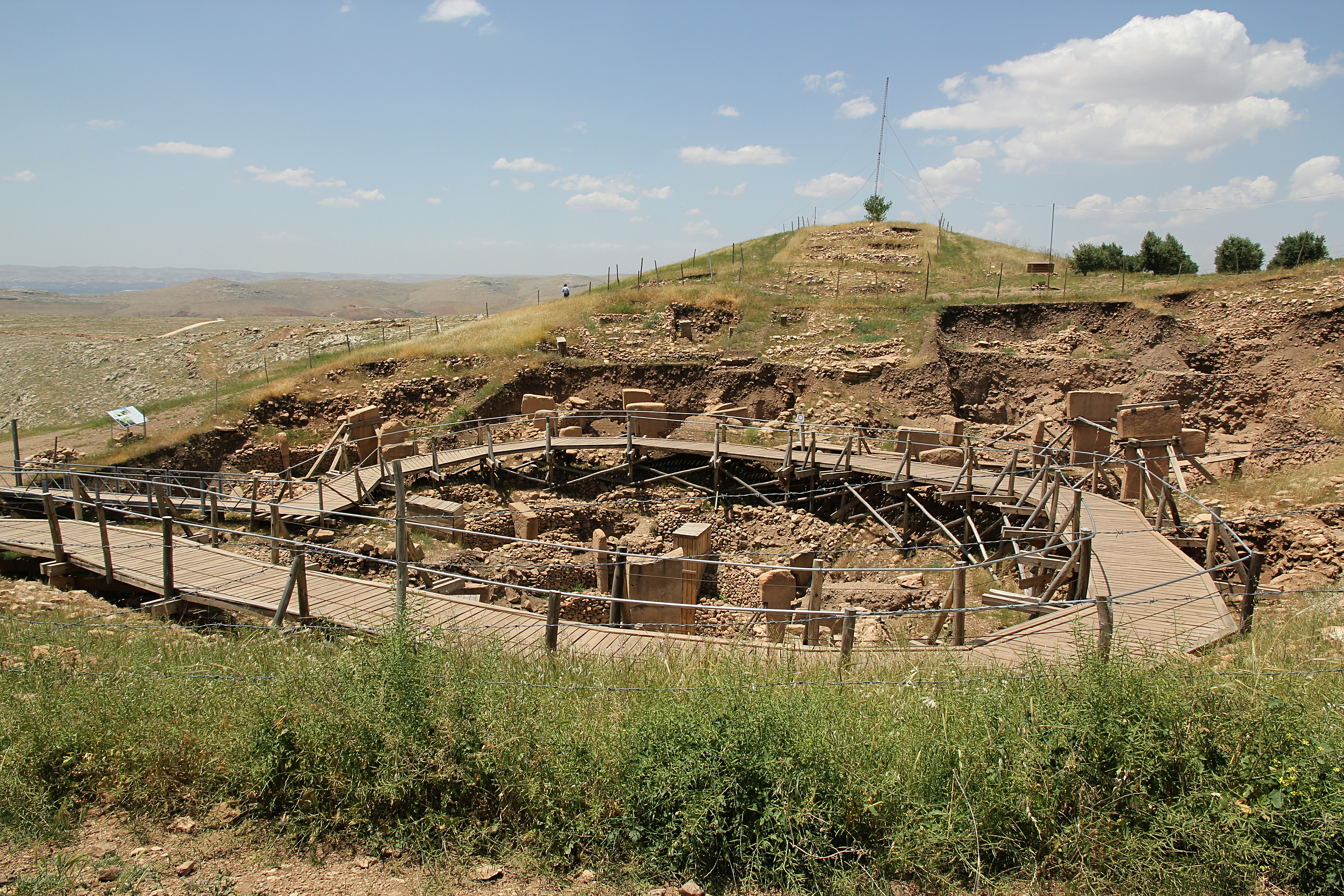 Göbekli Tepe, Siedlungshügel bei Şanlıurfa, Südosttürkei, Hauptgrabungsfeld von Osten